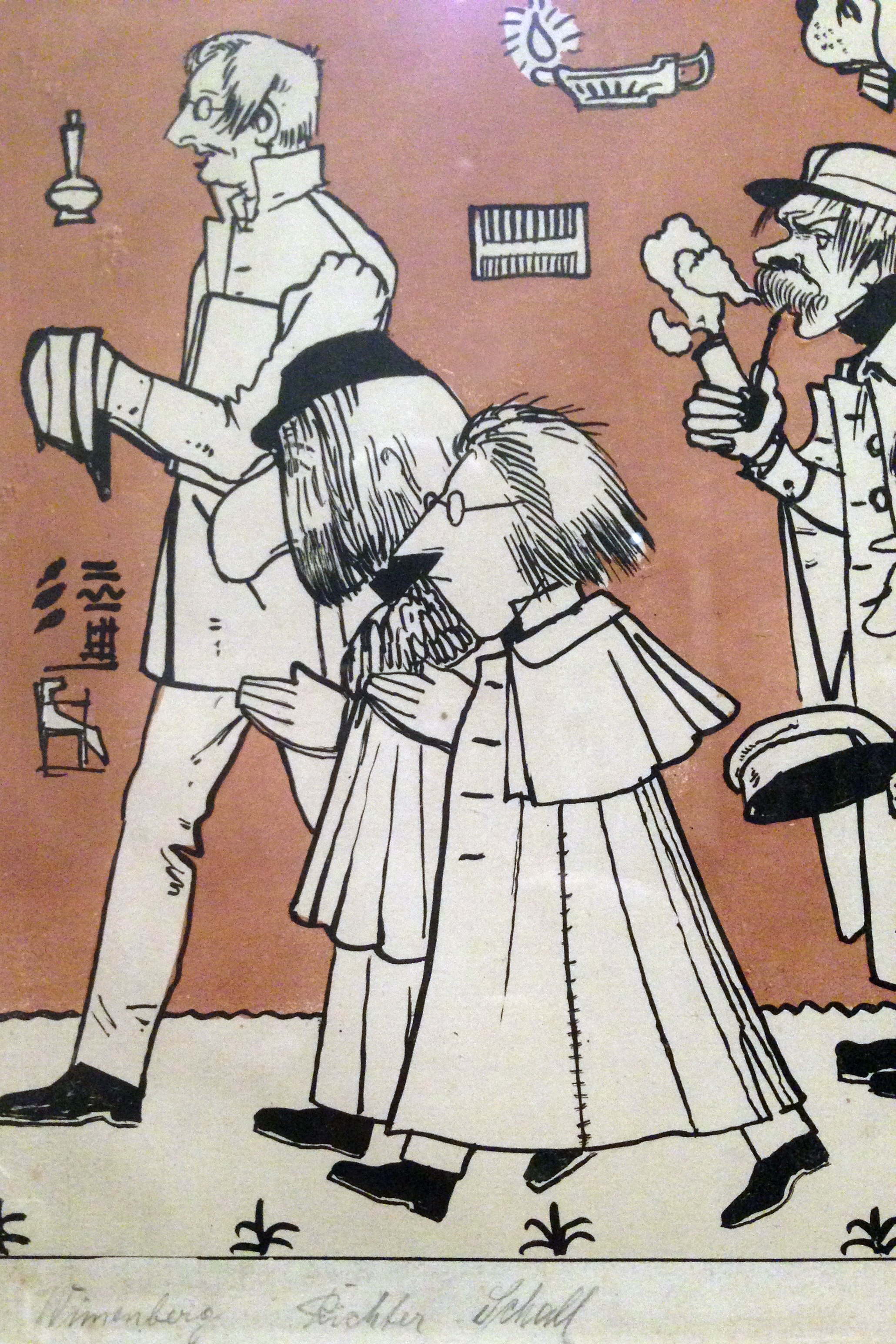 "Zug der Düsseldorfer Künstler" von 1837, Karikatur seiner malenden Zeitgenossen II, Andreas Achenbach – Ausschnitt Ludwig Richter, Raphael Schall